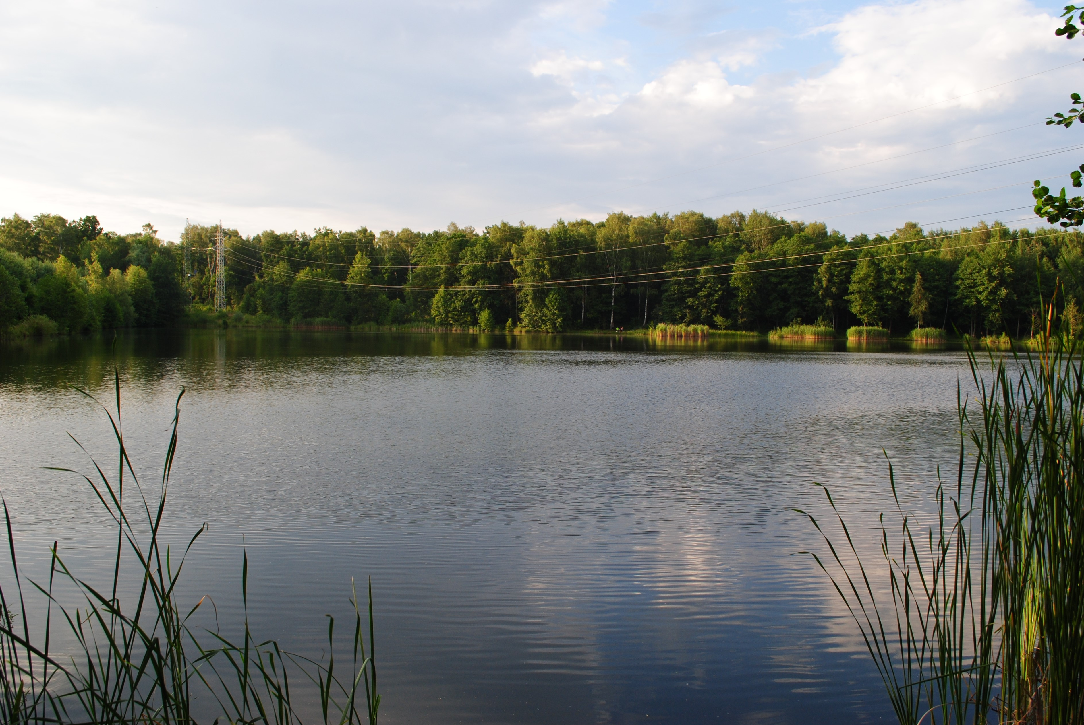 Katowice - Janów-Nikiszowiec. Staw Bolina II